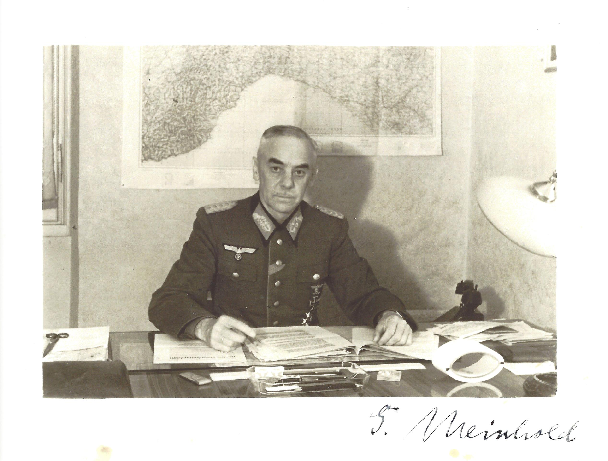 General Günther Meinhold vor einer Landkarte der Bucht von Genua